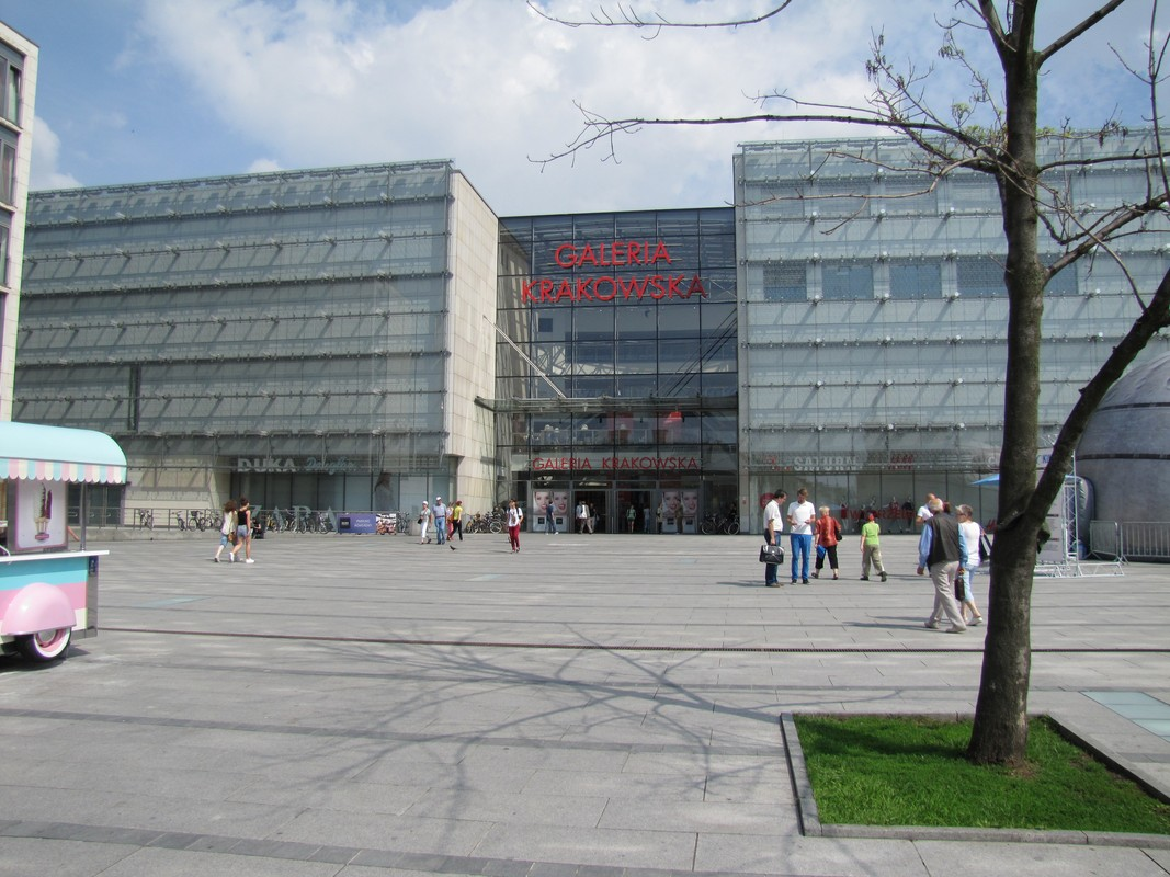 GALERIA KRAKOWSKA.